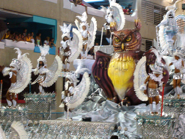 Carro alegórico abre-alas do GRES Sereno de Campo Grande